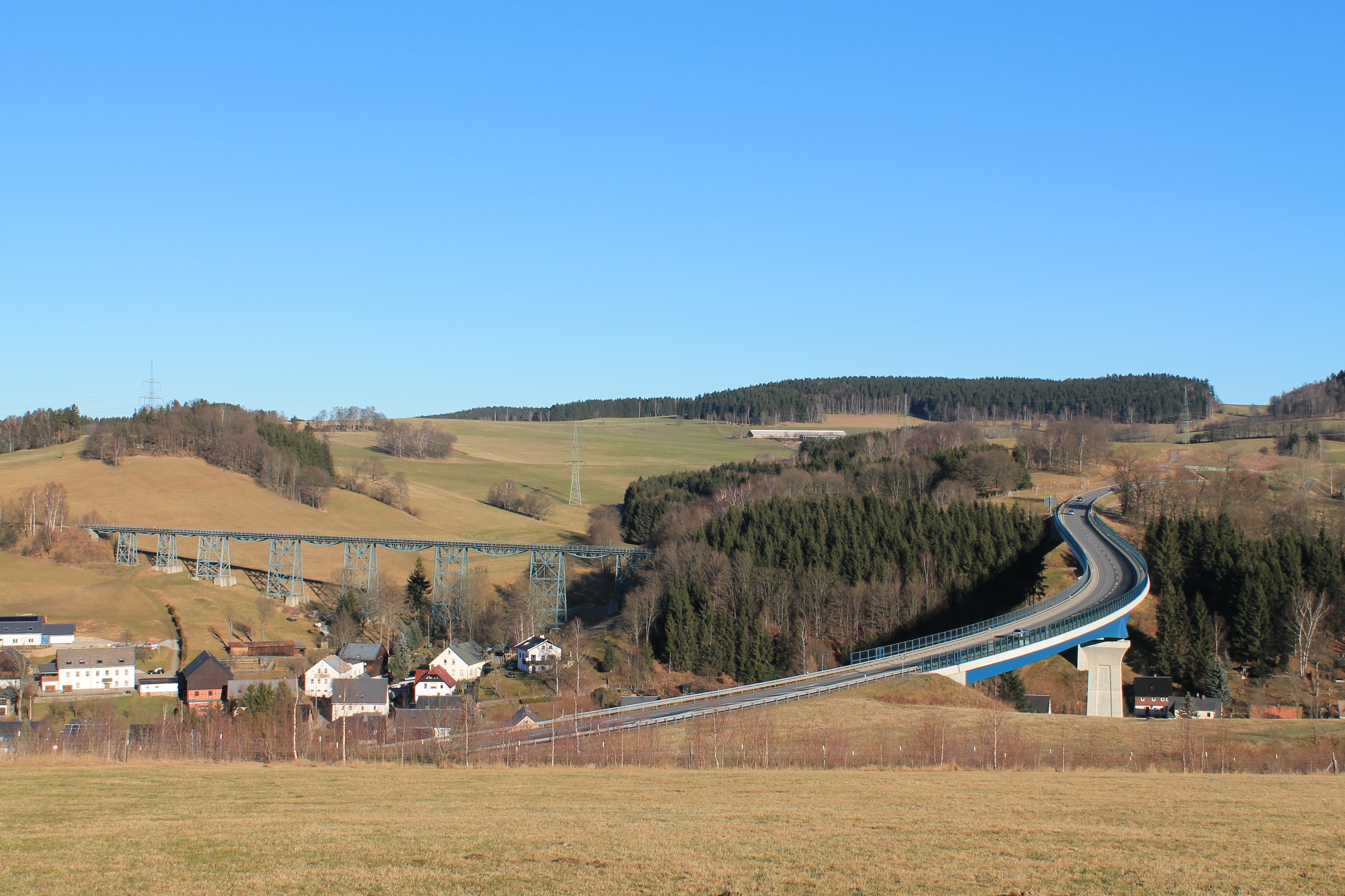 Das Markersbacher Viadukt mit der Brücke der Umgehungsstraße. Markersbach, Sachsen, Deutschland.